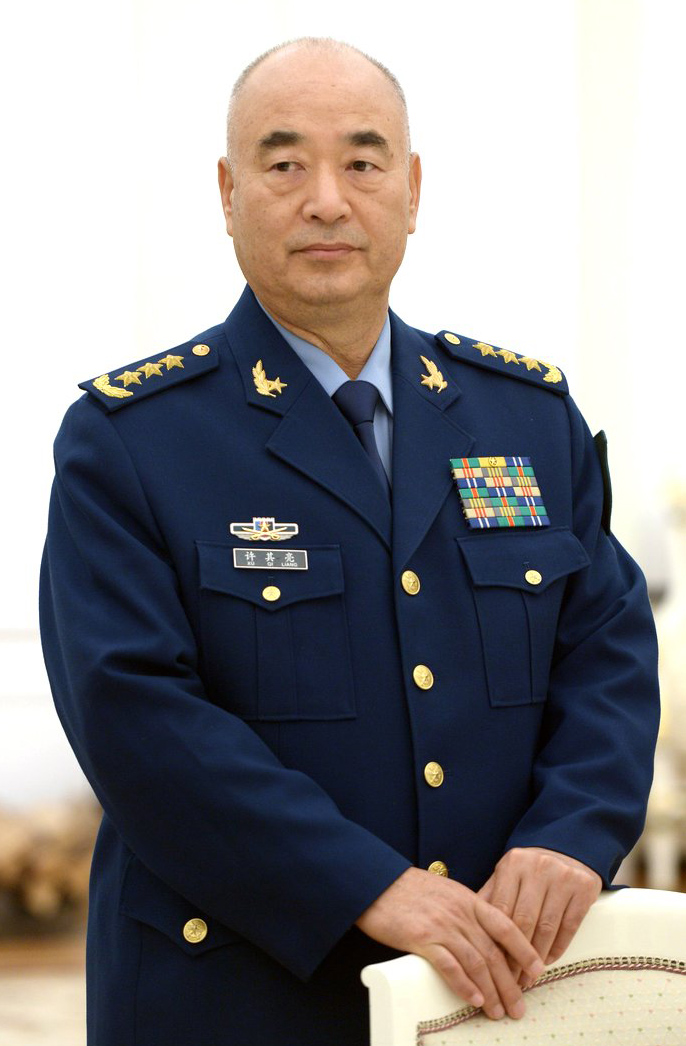 Заместитель председателя Центрального военного совета КНР Сюй Цилян перед встречей с Президентом России Владимиром Путиным